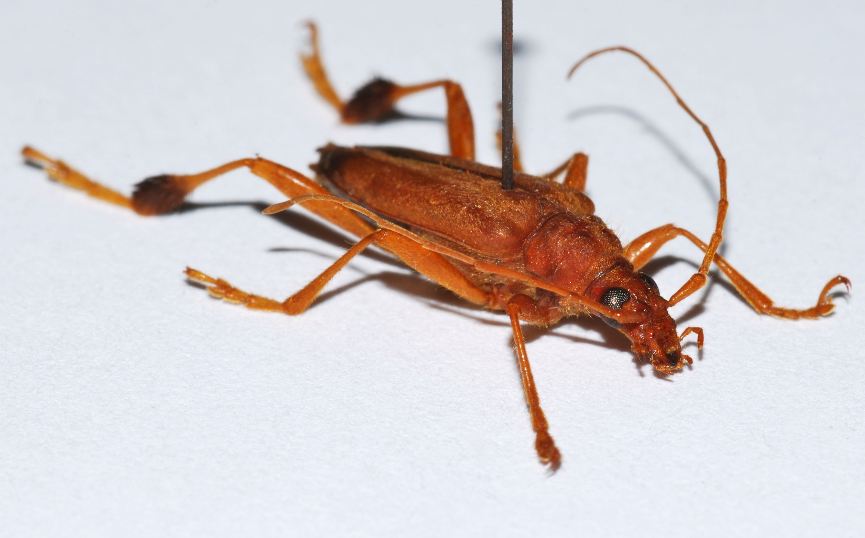 Beparasy, MADAGASCAR